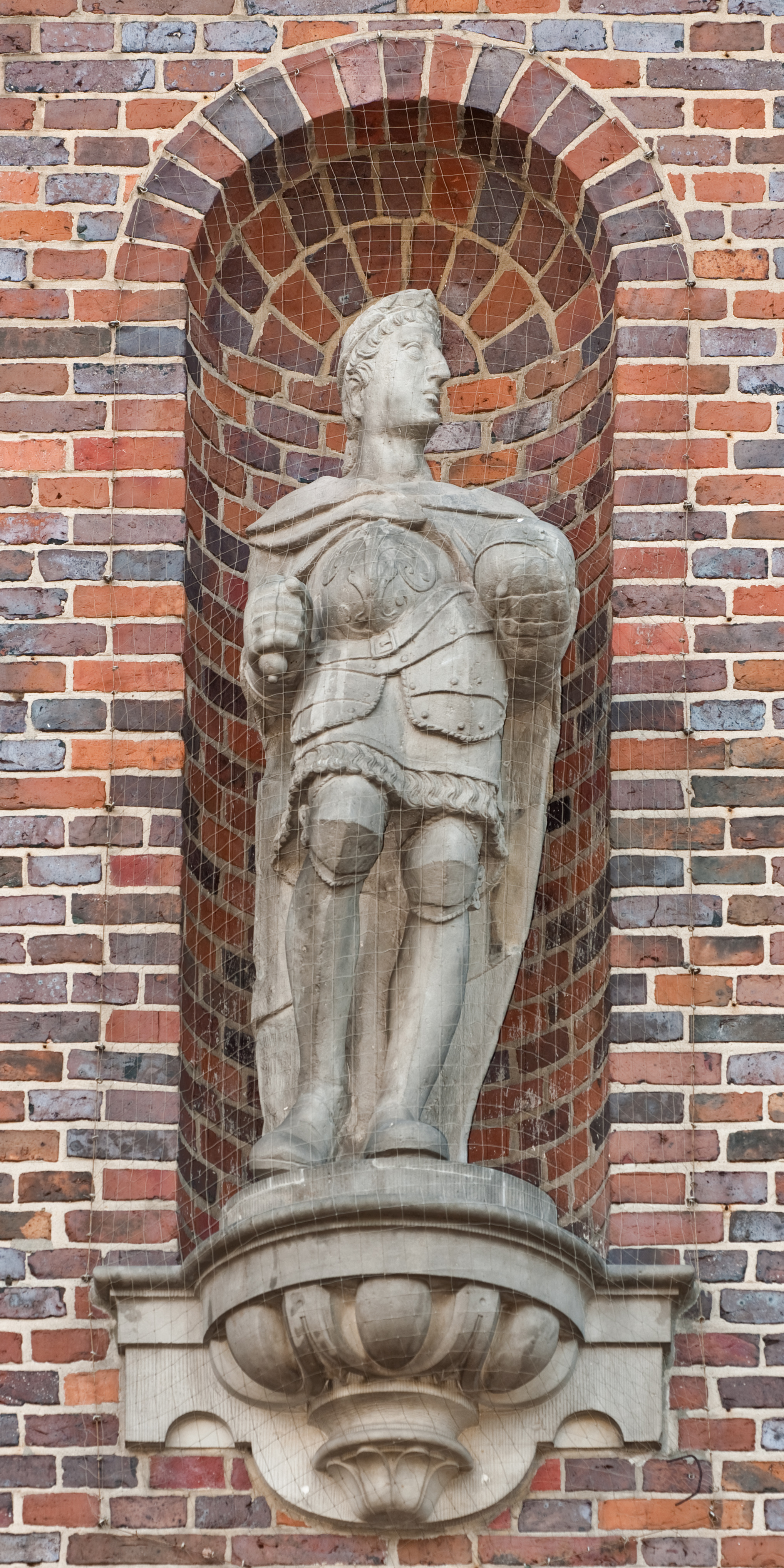 Eine von 21 Kaiserfiguren, die ursprünglich 1602 und 1649 als Bauschmuck eines Anbaus des Alten Rathauses von Hamburg geschaffen wurden. Nachdem das Rathaus 1842 beim Großen Brand zerstört wurde, wurden 20 Statuen beim Neubau des MHG (1913 - 1922) in der Nordfassade platziert. Heute befinden sich noch 14 Figuren in der Fassade. Die anderen sechs mußten nach Kriegsschäden entfernt werden. Die Statue "Ludwig der Fromme" steht in der oberen Reihe an zweiter Stelle von links (vom Betrachter aus gesehen).